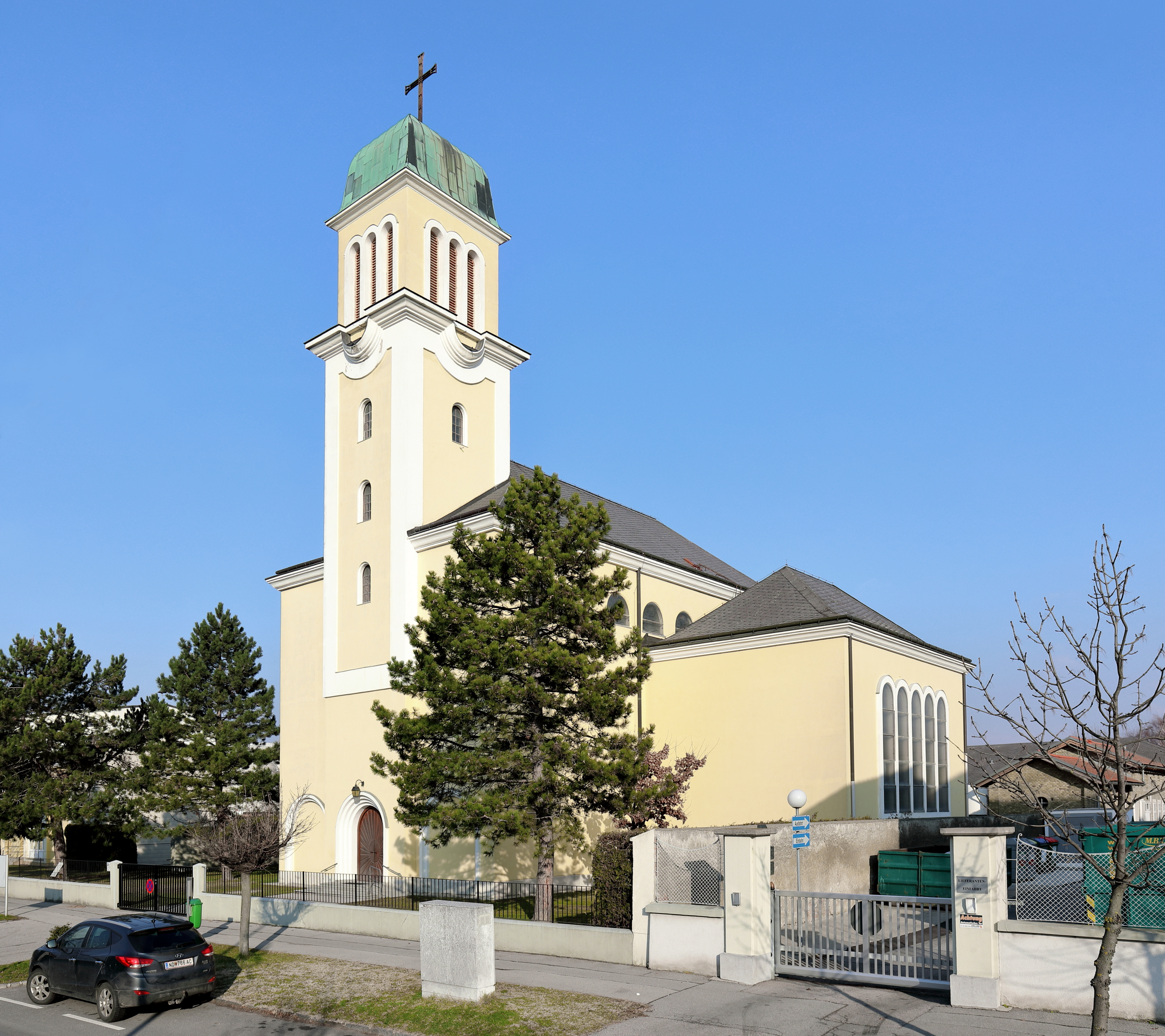 Südwestansicht der röm.-kath. Pfarrkirche zur Kreuzerhöhung in der burgenländischen Marktgemeinde Kittsee.Die dreischiffige Kirche hat einen rd. 36 m hohen (inklusive Kreuz) eingebundenem Westturm mit haubenförmigem Helm und eine halbrunde Apsis. Die Kirche mit einem Fassungsraum für rund 1250 Personen wurde nach den Plänen der Architektin Helene Koller-Buchwieser vom Baumeister Stefan Wilhelm Haderer ab 1948 errichtet und am 16. Nov. 1952 von Bischof Josef Schoiswohl eingeweiht.